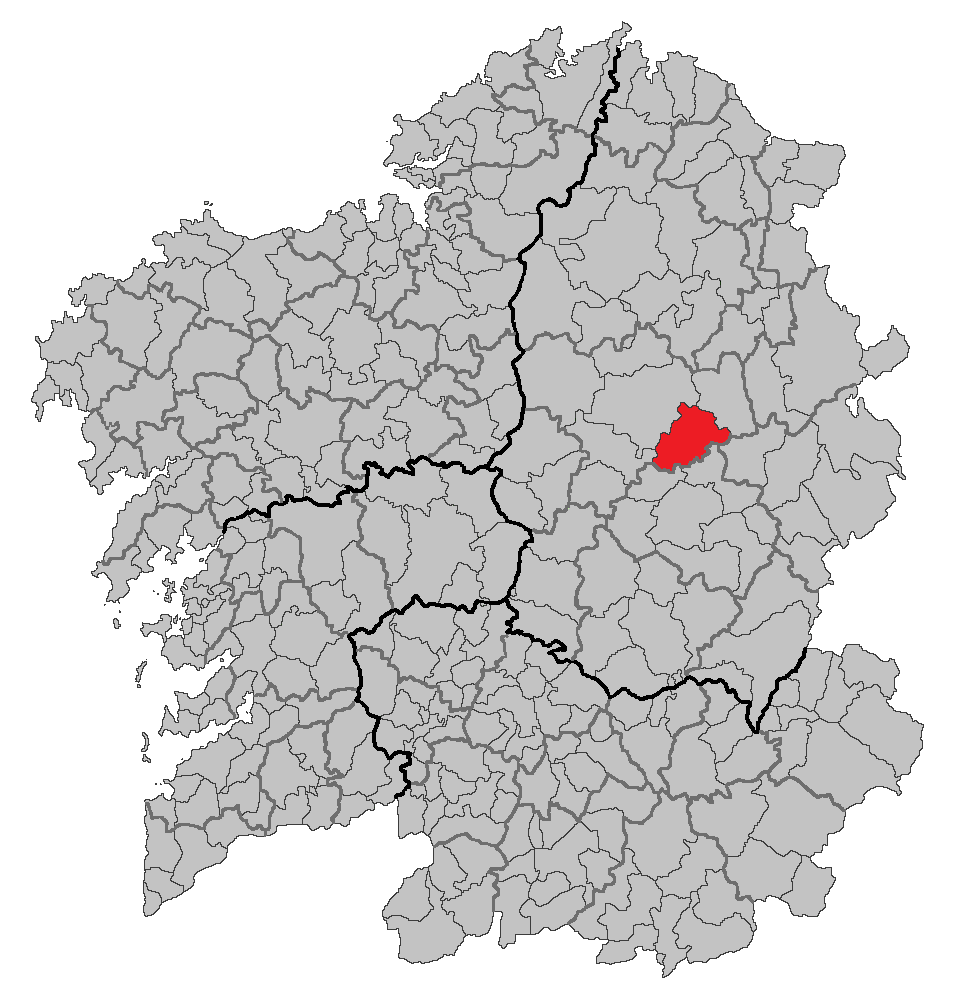 Mapa coa localización do concello de O Corgo.